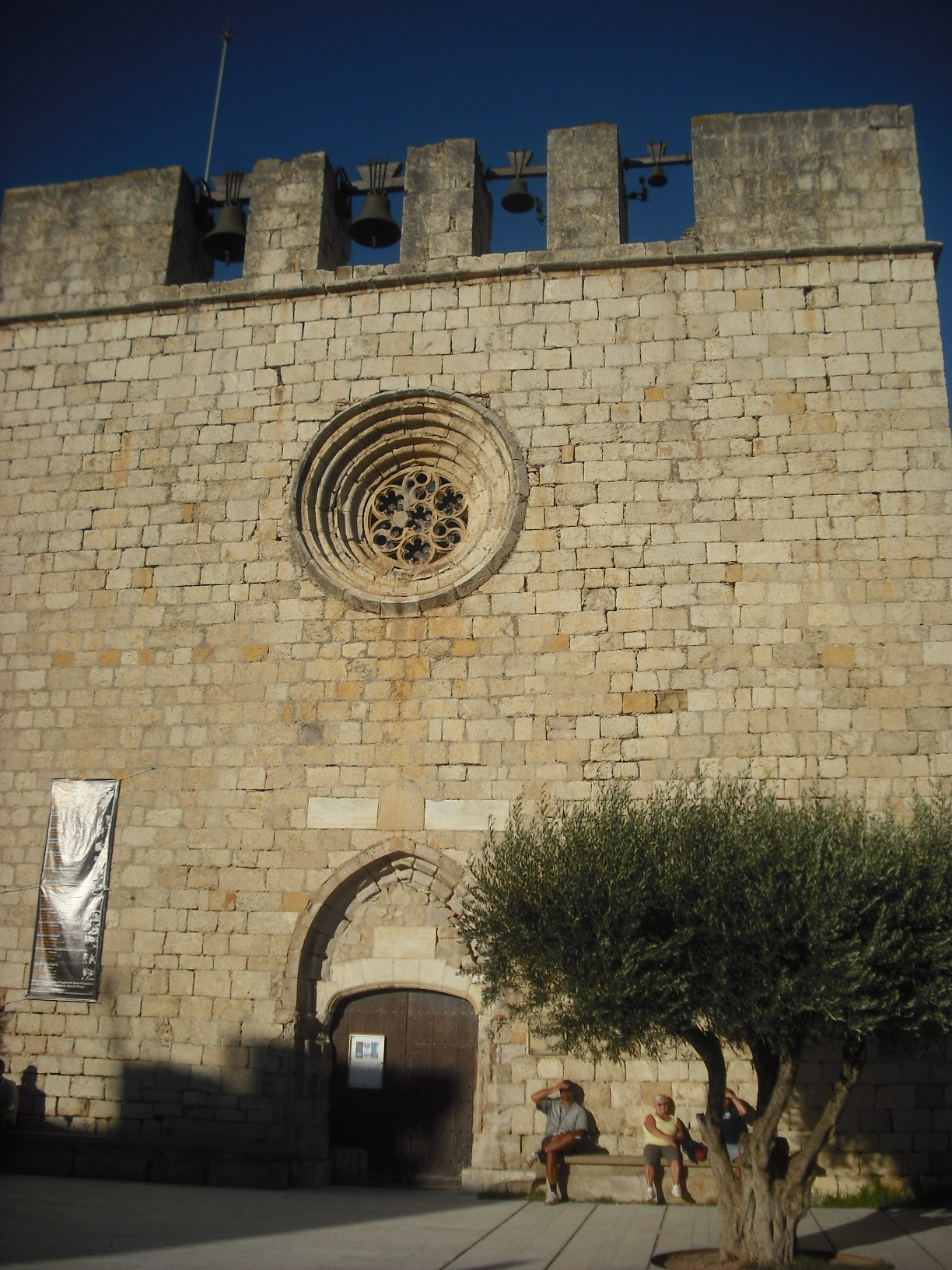 Façana de l'església de Sant Martí de Sant Martí d'Empúries.